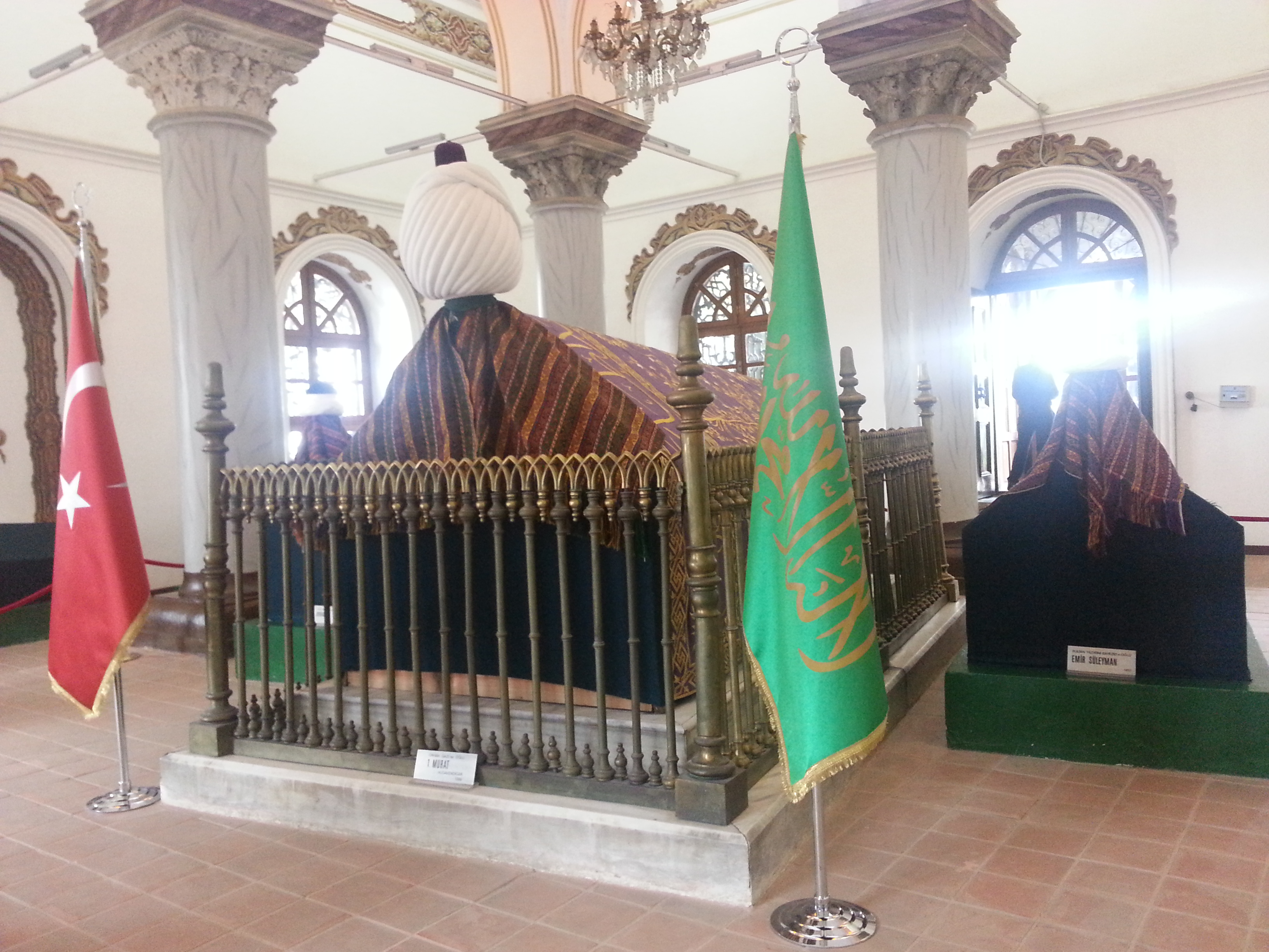 Türbe Sultan Murads I.